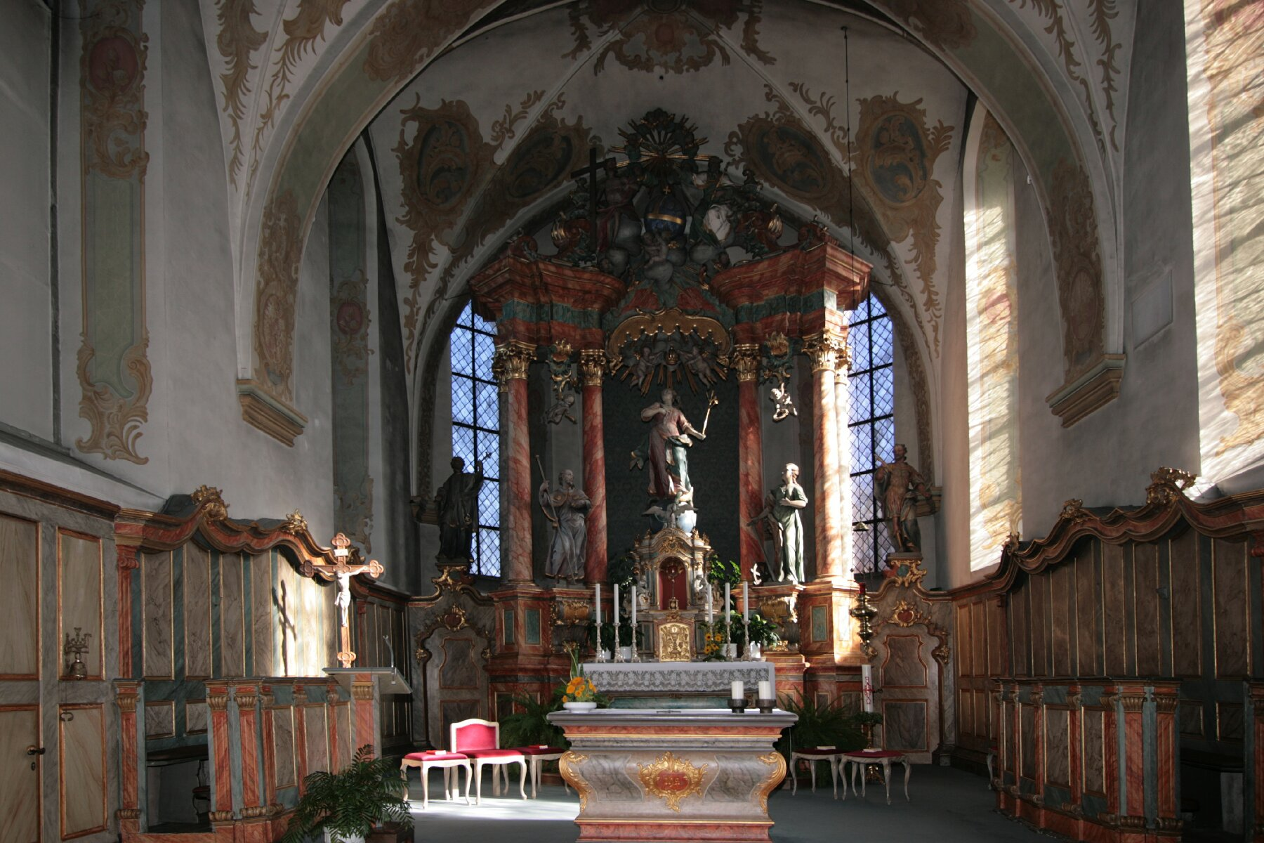 Altar und Innenraum Kirche in Remblinghausen